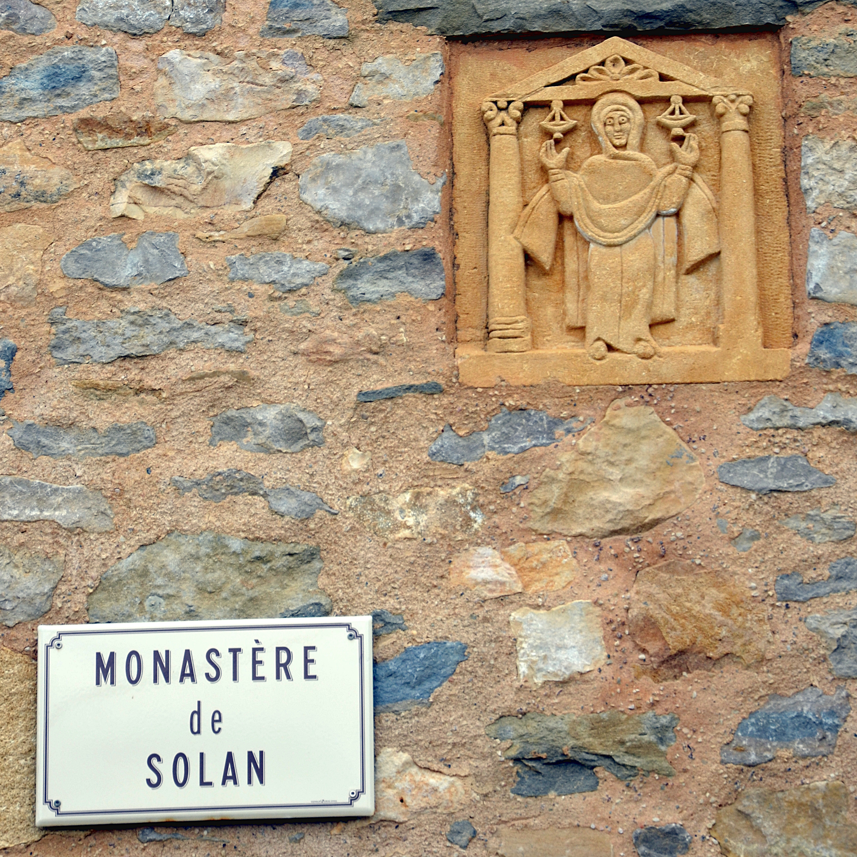 При входе в Покровский монастырь в Солане.